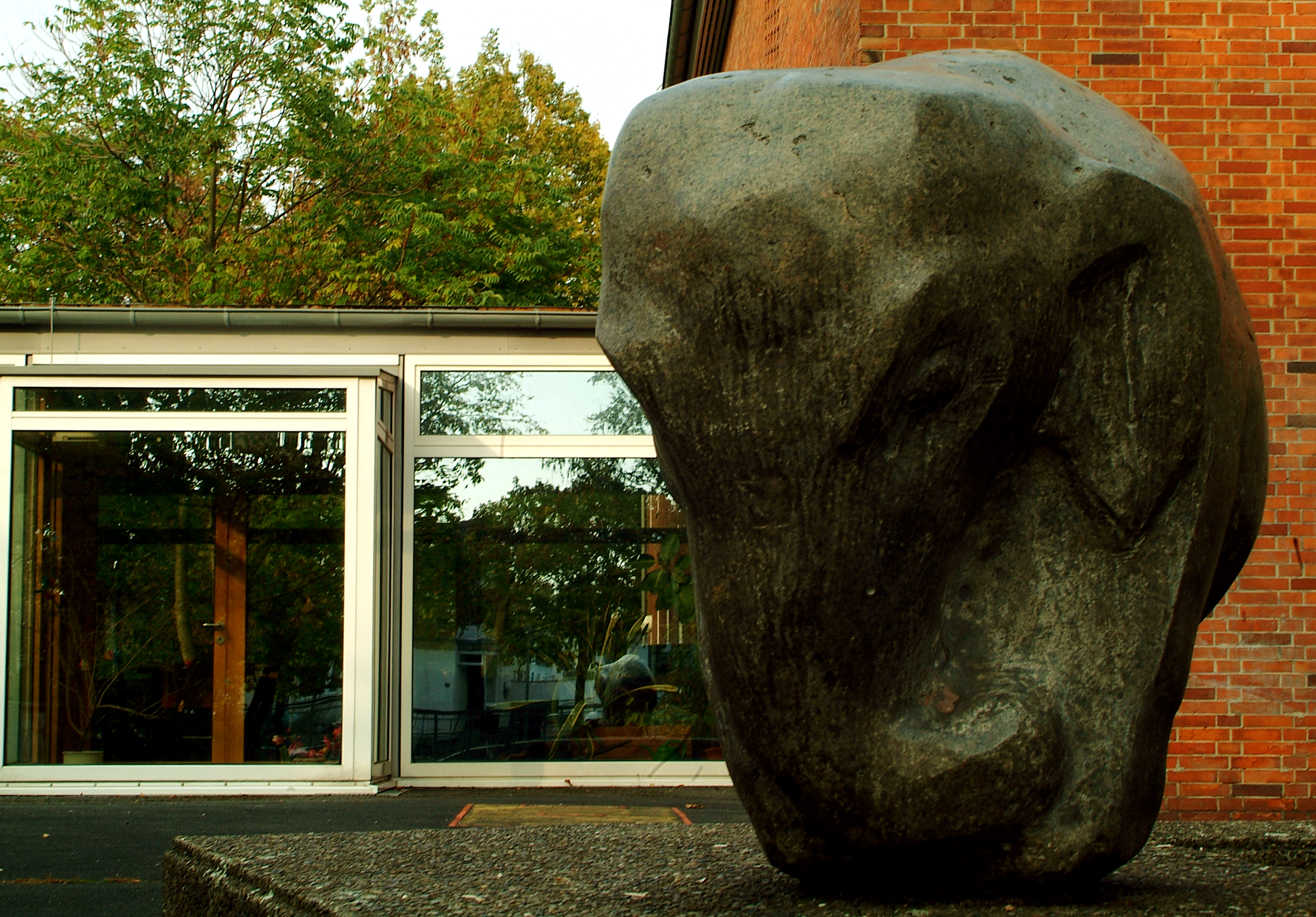 Die Skulptur Elefant schuf der Bildhauer Peter Greve 1956: Bei den Ausschachtungsarbeiten zum Bau der damaligen Sonderschule (heute:Förderschule) in der Pyrmonter Straße in Oberricklingen in Hannover fand man einen Findling. Die Stadt Hannover beauftragte daraufhin den Bildhauer mit der Schaffung der Skulptur.